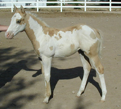 Frame Overo foal